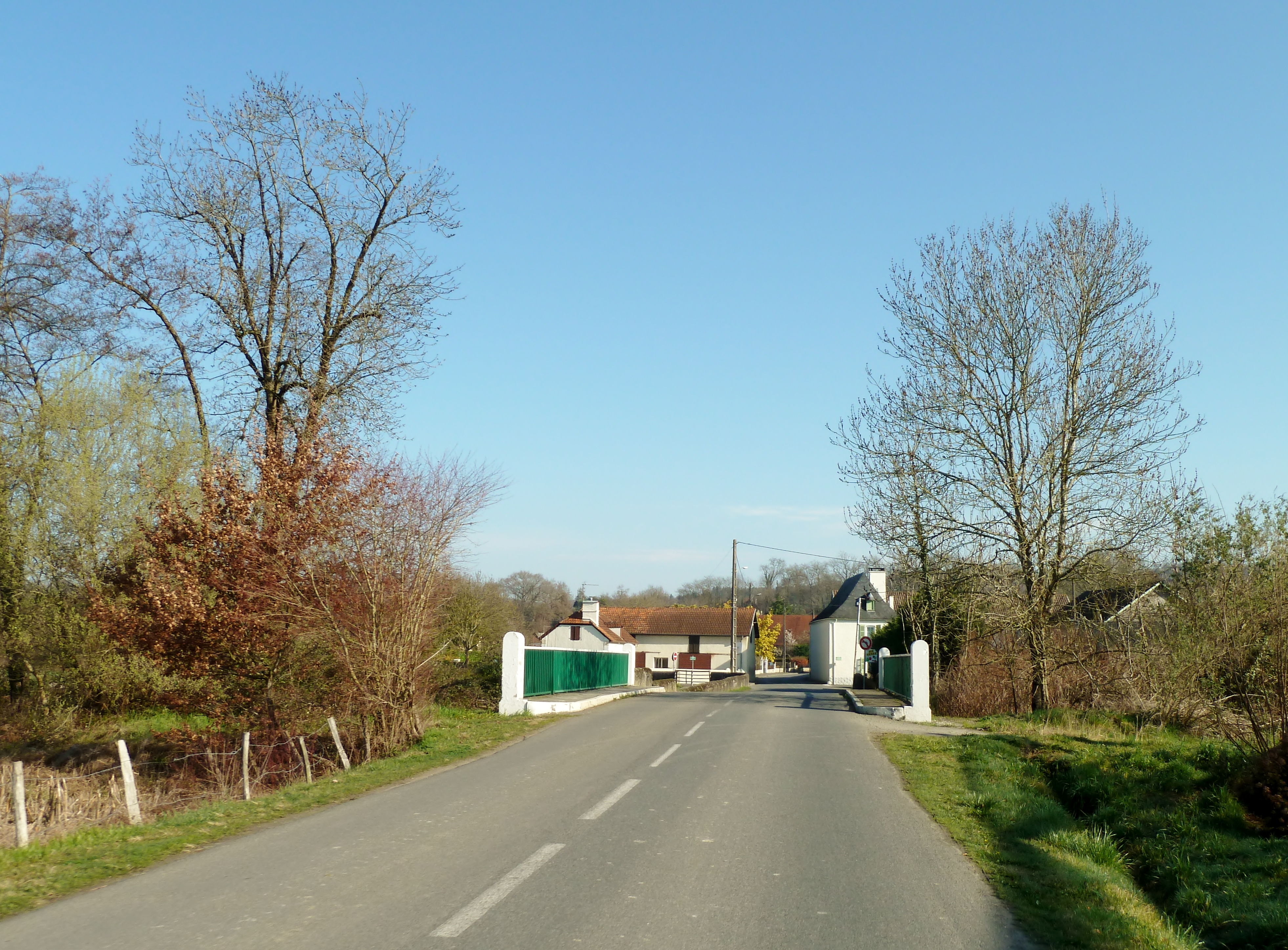 Aussevielle